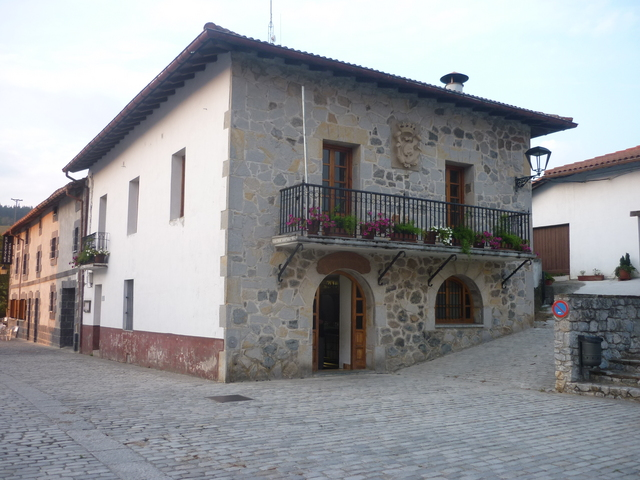 Gipuzkoako Gaintzako Herriko Plaza.